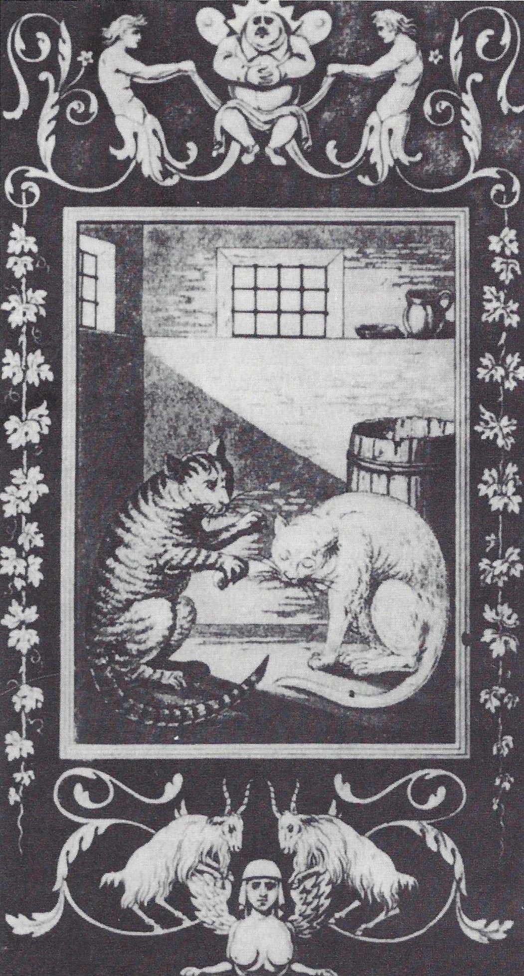 Umschlagszeichnung von E. T. A. Hoffmann für den 1. Band der Erstausgabe des Romans "Lebensansichten des Katers Murr"